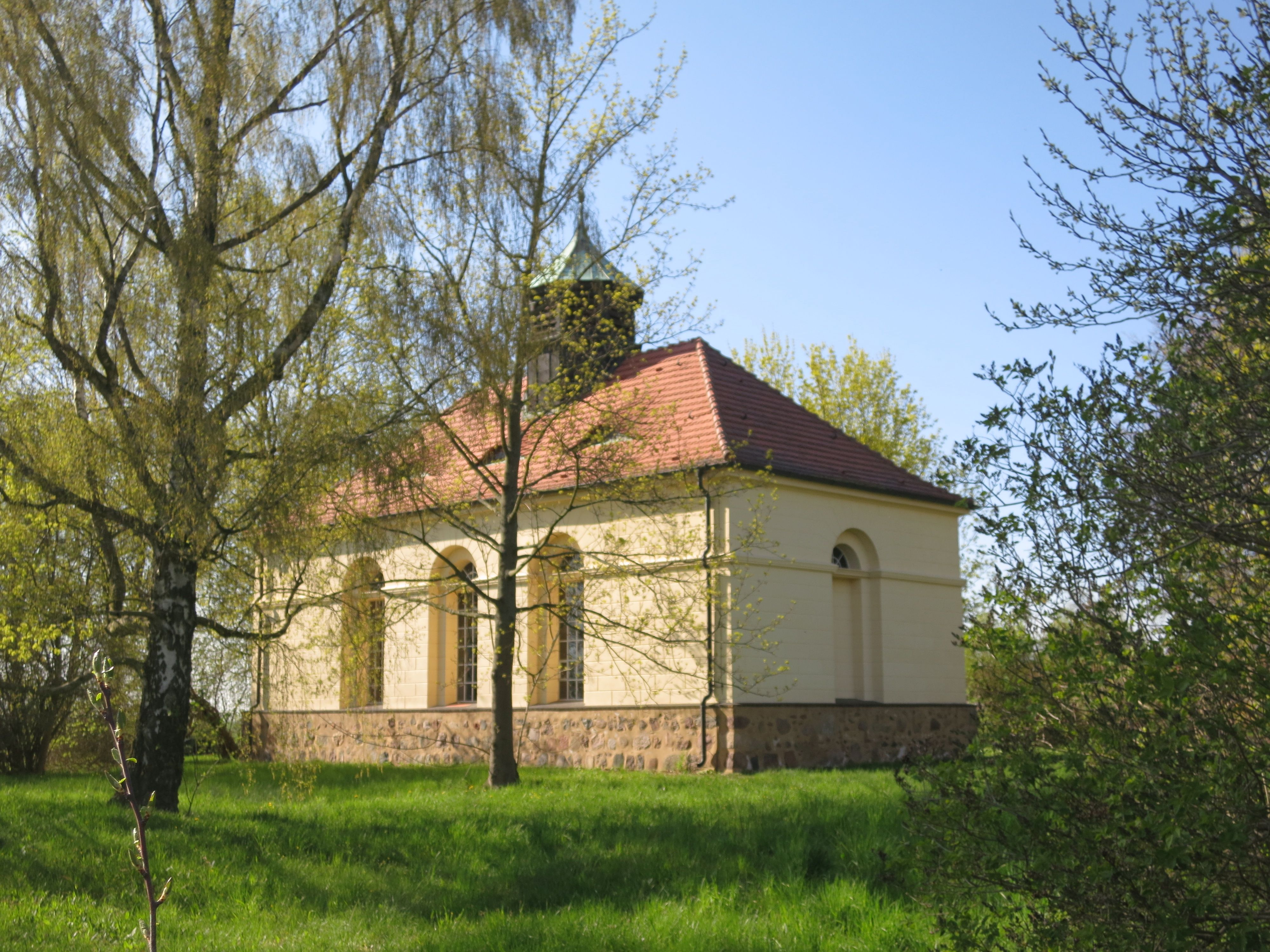 Denkmalgeschützte Kirche in Feldheim, Stadt Treuenbrietzen